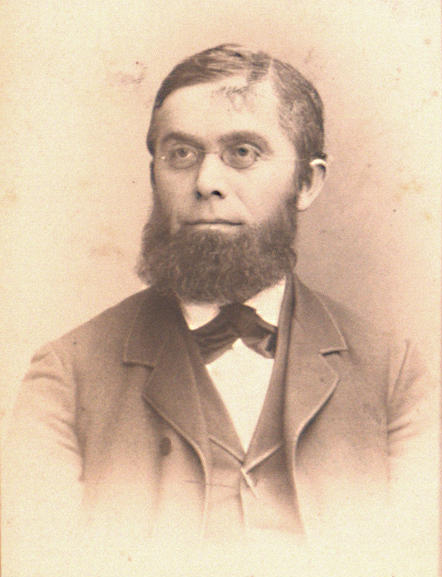 Kneucker, (Johann) Jakob